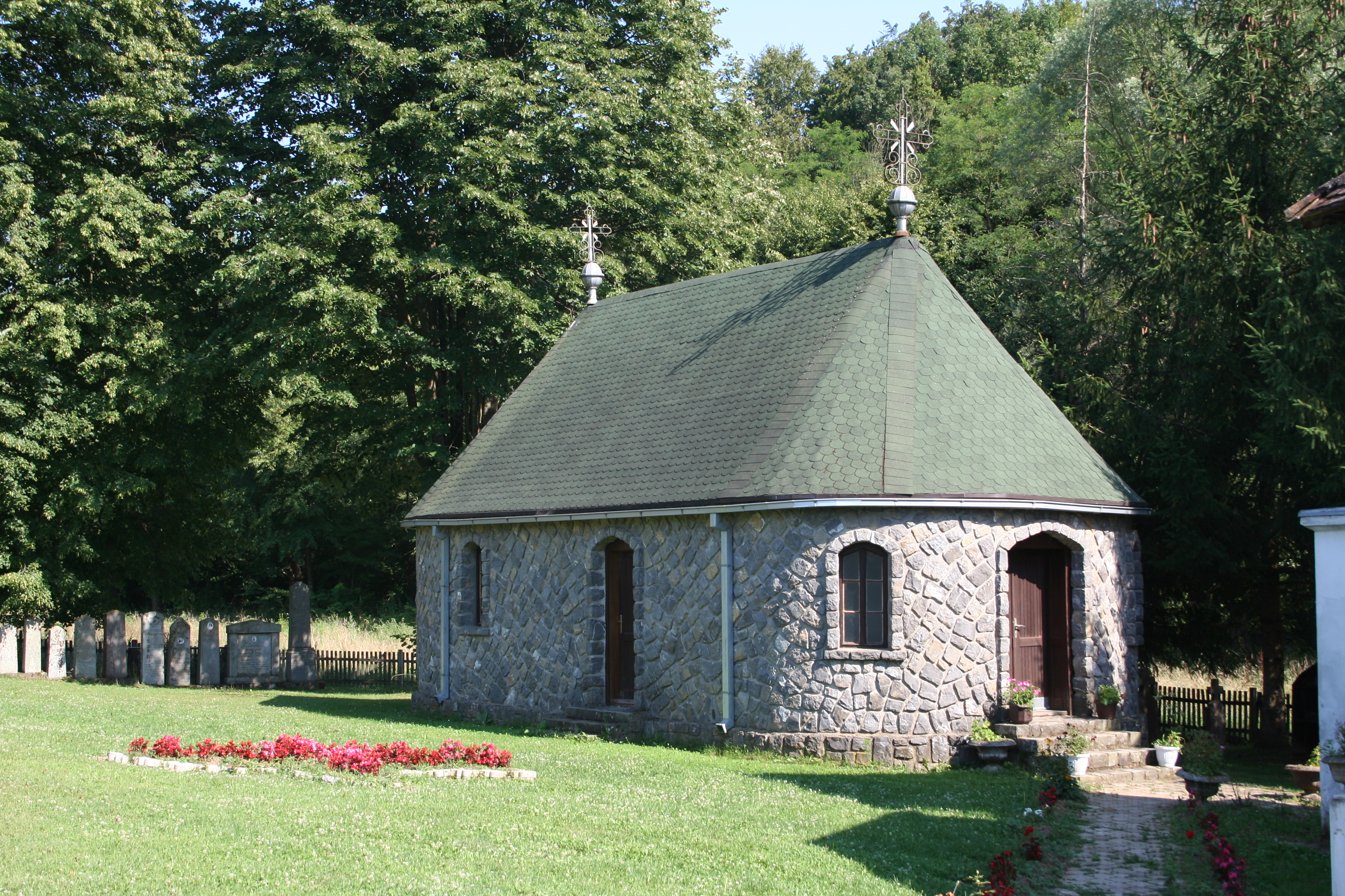 Crkva Sv. Ilije, Tekeriš